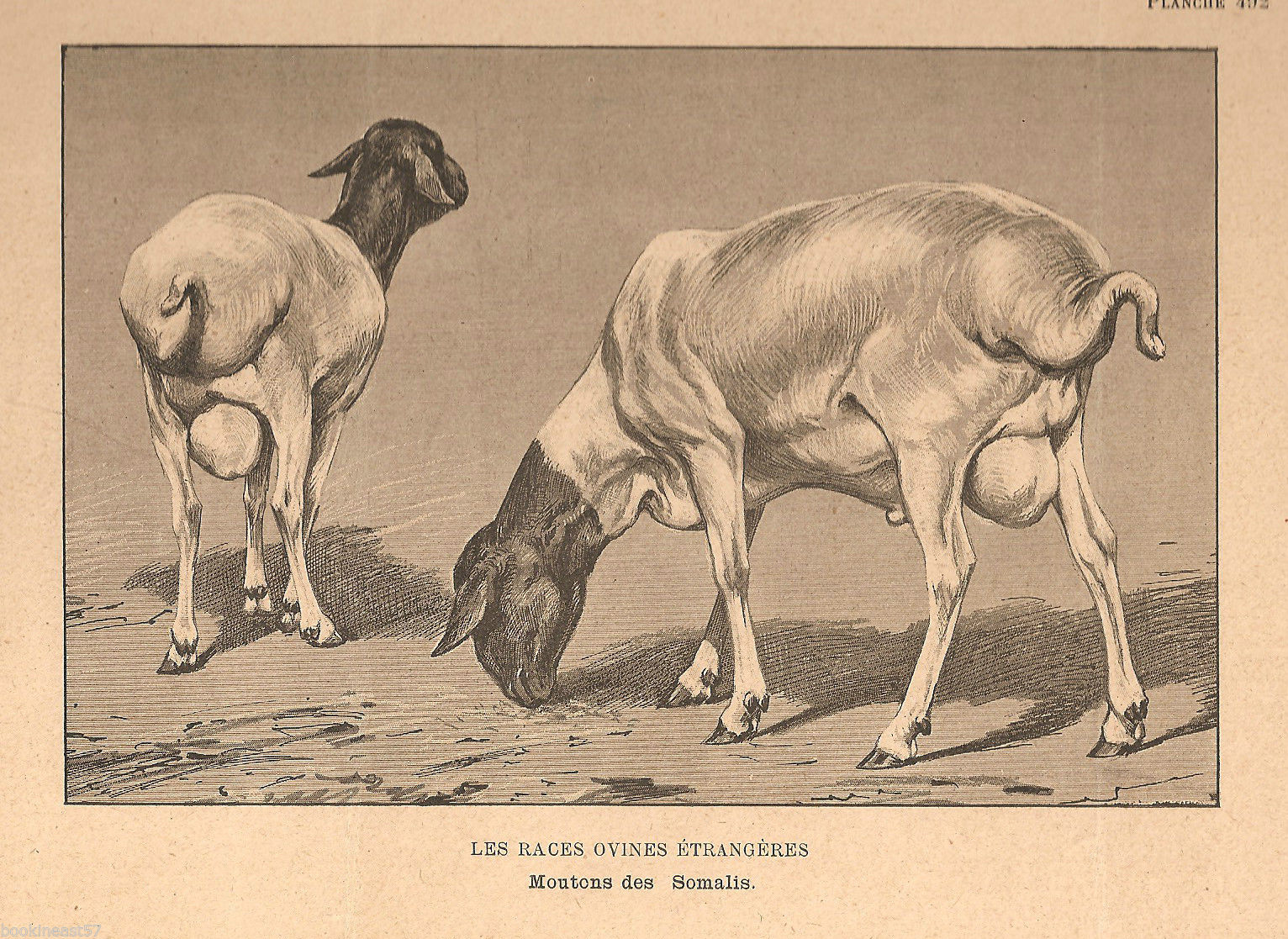 Moutons des Somalis, Le Journal des éleveurs, vers 1910.